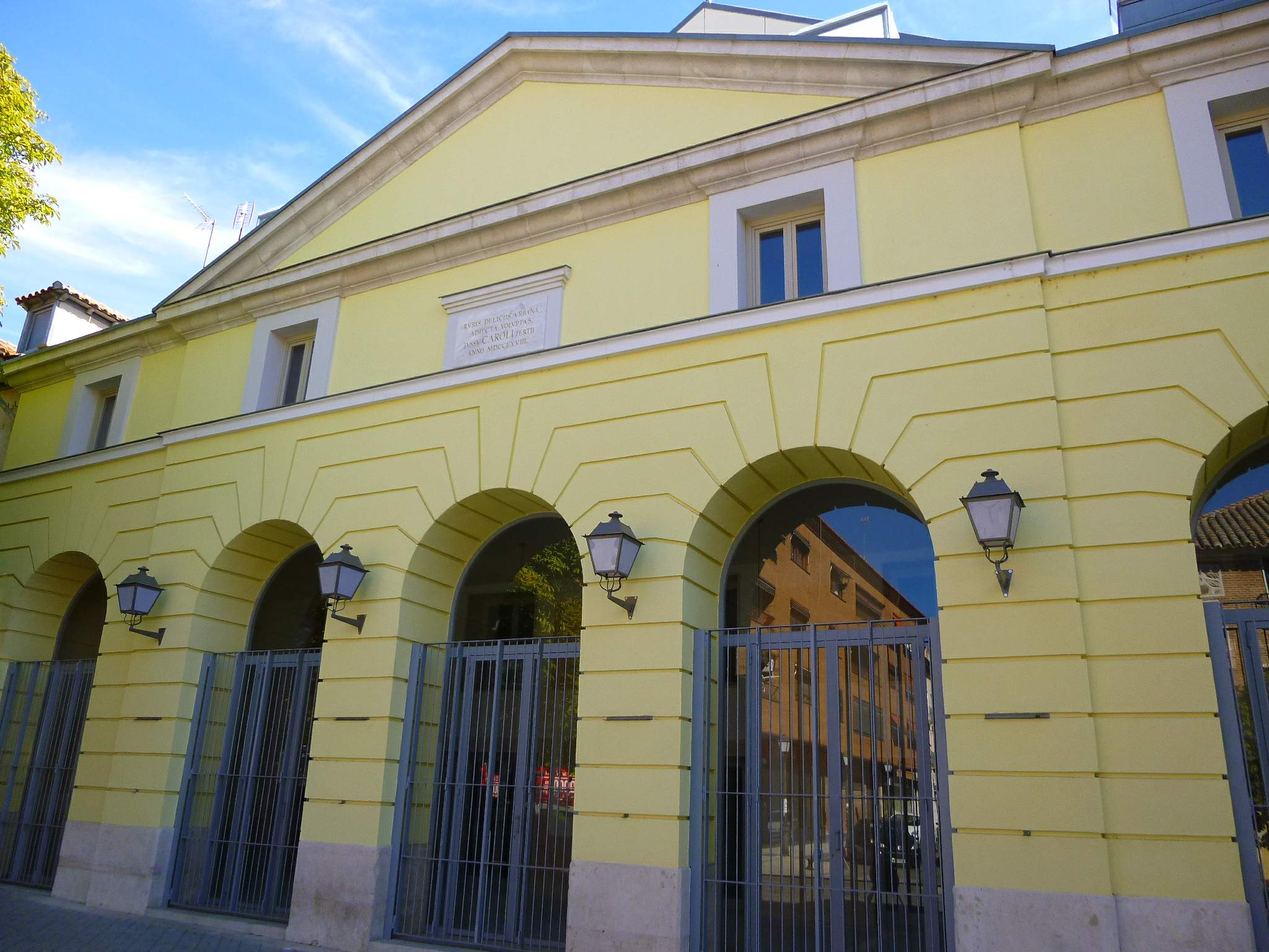 Teatro Real de Aranjuez